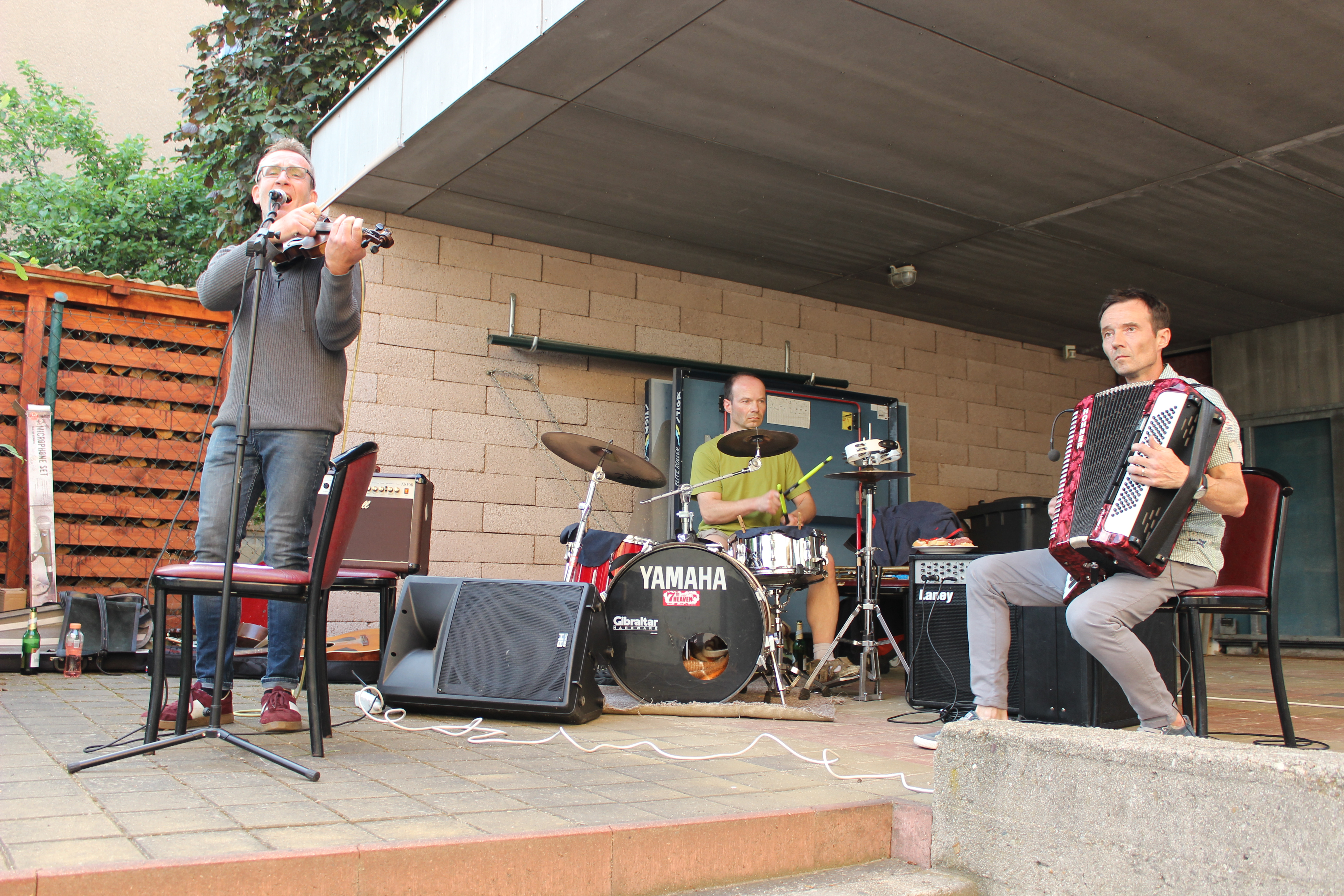 Uskupení Pláče kočka při svém vystoupení během Noci kostelů 2018 v kostele U Jákobova žebříku.